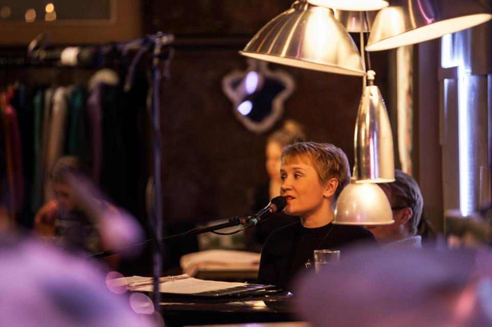 Pianisti, laulaja, lauluntekijä Tuija Rantalainen